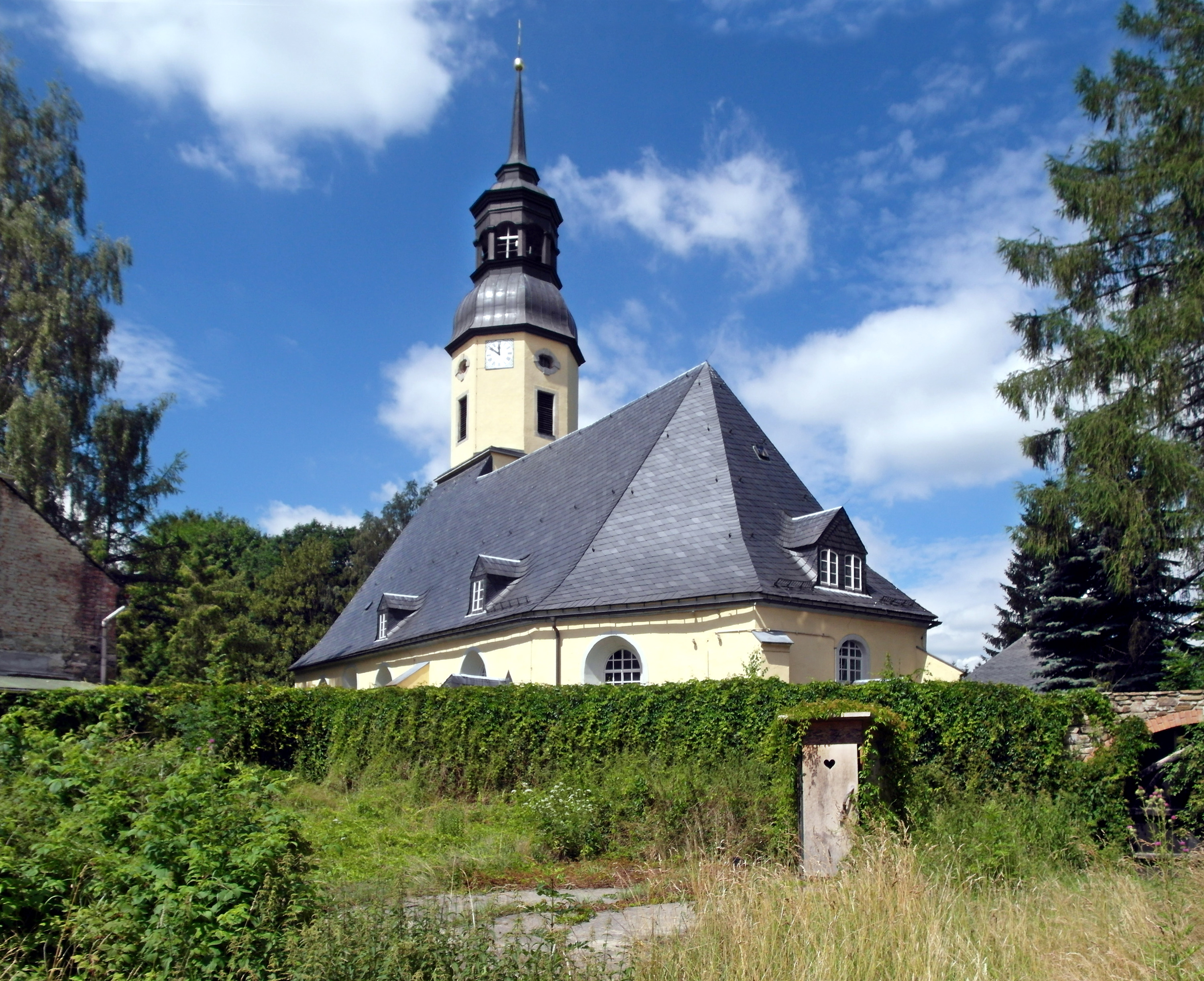 18.07.2016 09619 Dorfchemnitz: Evangelische Dorfkirche Dorfchemnitz, Am Kirchberg. Es ist sicher belegt, daß es 1539 in Dorfchemnitz schon eine Kirche gab. Jedoch ist unbekannt, wie diese aussah. Diese Kirche wurde in den folgenden Jahrhunderten mehrmals umgebaut und vergrößert, bis sie 1893 die Gestalt erhielt, die sie noch heute hat. [SAM7003.JPG]20160718355DR.JPG(c)Blobelt